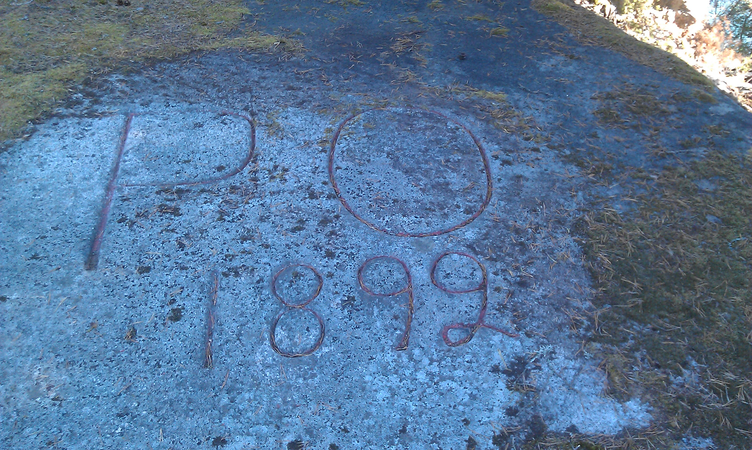 Ristning "PO 1892" på toppen av Pelarordsberget i Norrviken på Högmarsö i Stockolms skärgård. Ristningen upptar ungefär en kvadratmeter och är gjord i horisontalplanet på berghällen. Ristningen gjordes när Pelarorden grundades.